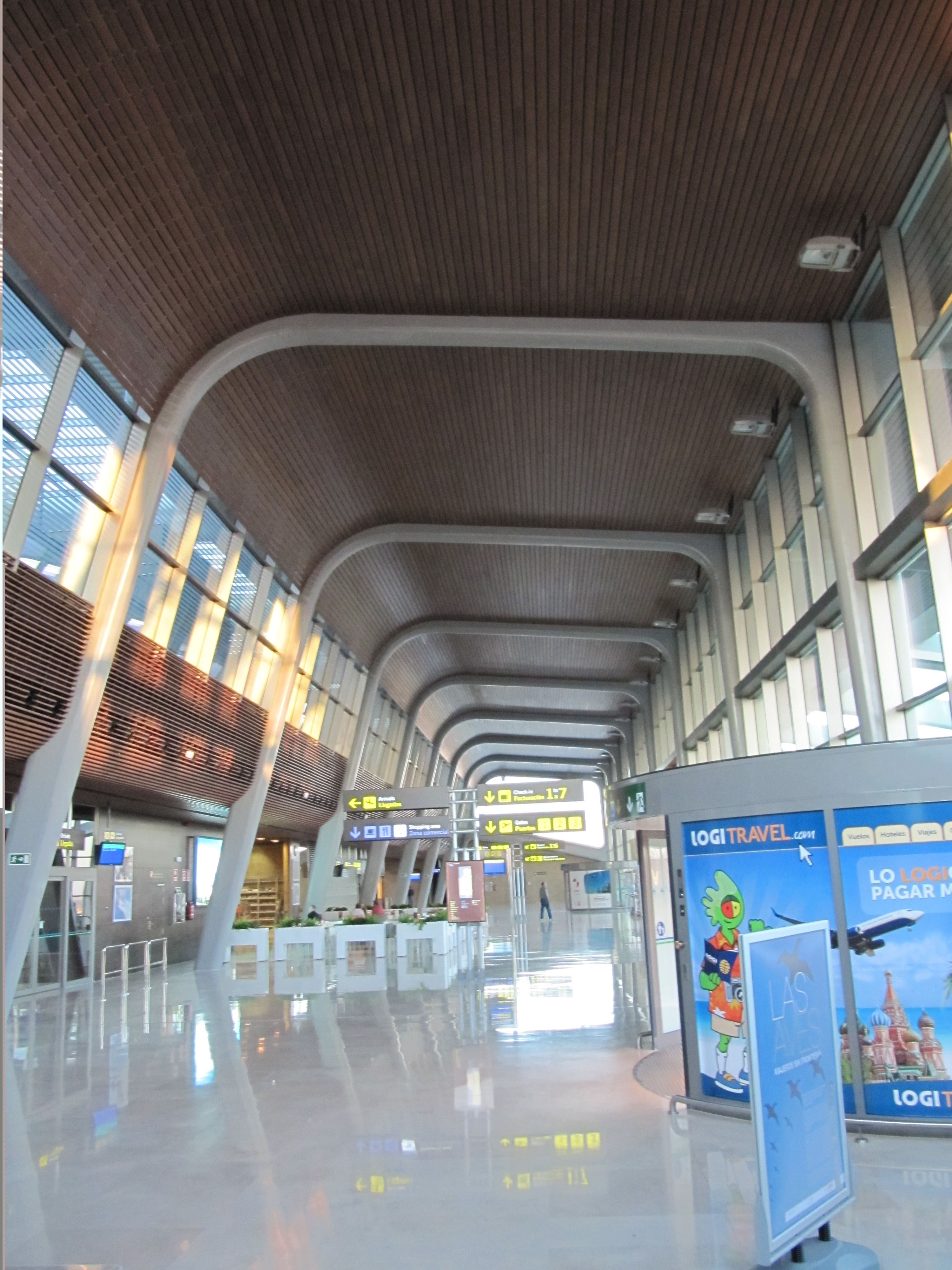 Interior de la nueva terminal del aeropuerto de León.